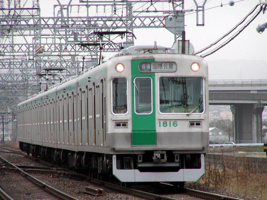 京都市交通局10系